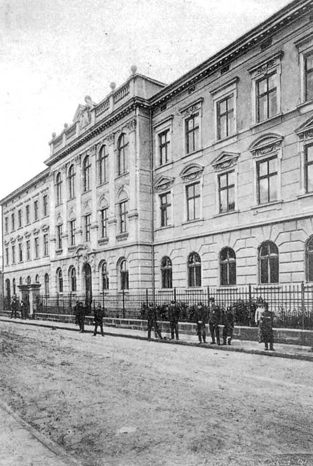 Wyższe szkoły realnej dla małych początku ubiegłego wieku. (Numer School jeden, teraz ukraińskiego Gimnazjum University. Franko) Zbudowany w 1901 roku